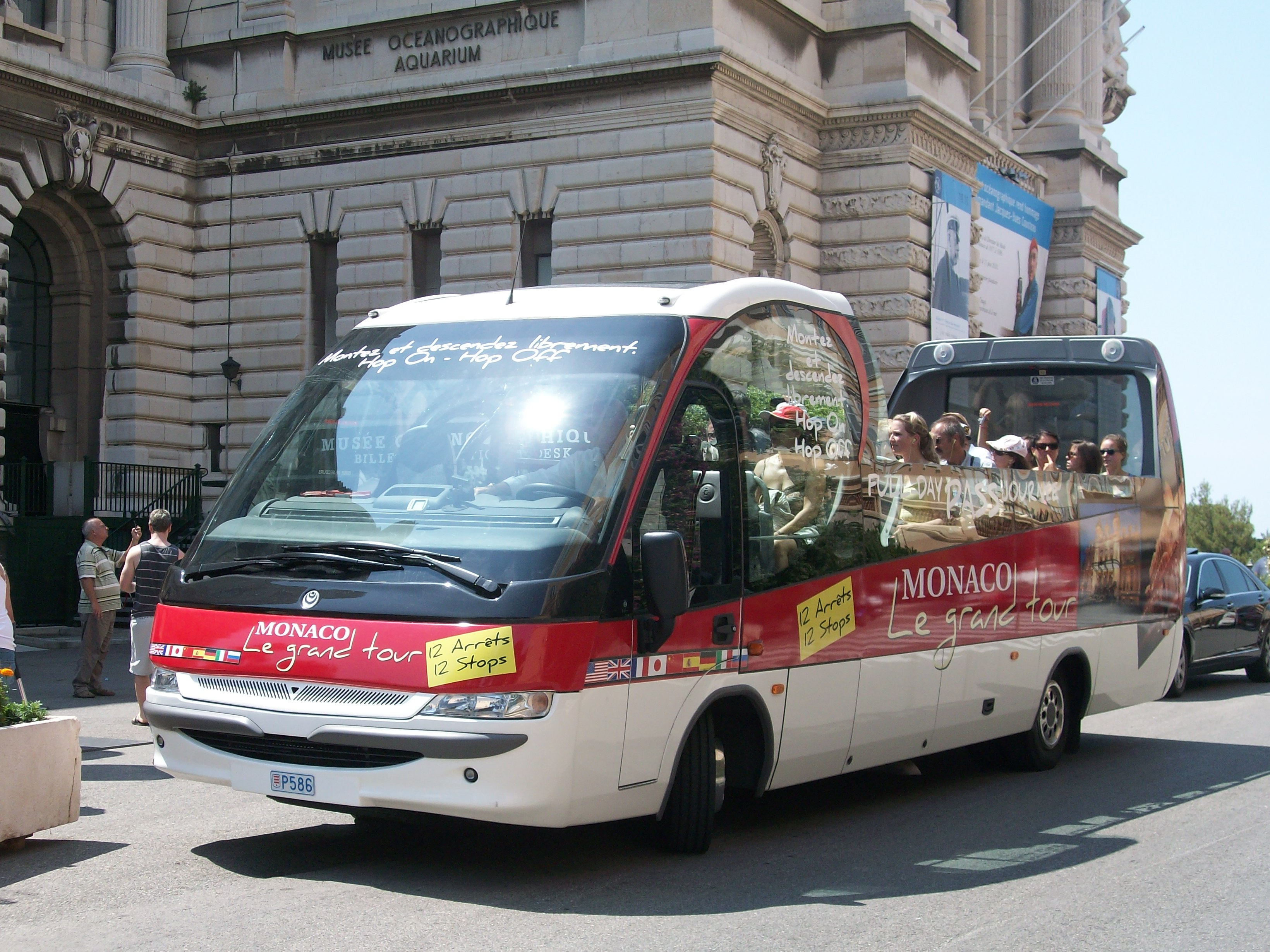 Bus "Monaco, Le grand tour!" , Monaco